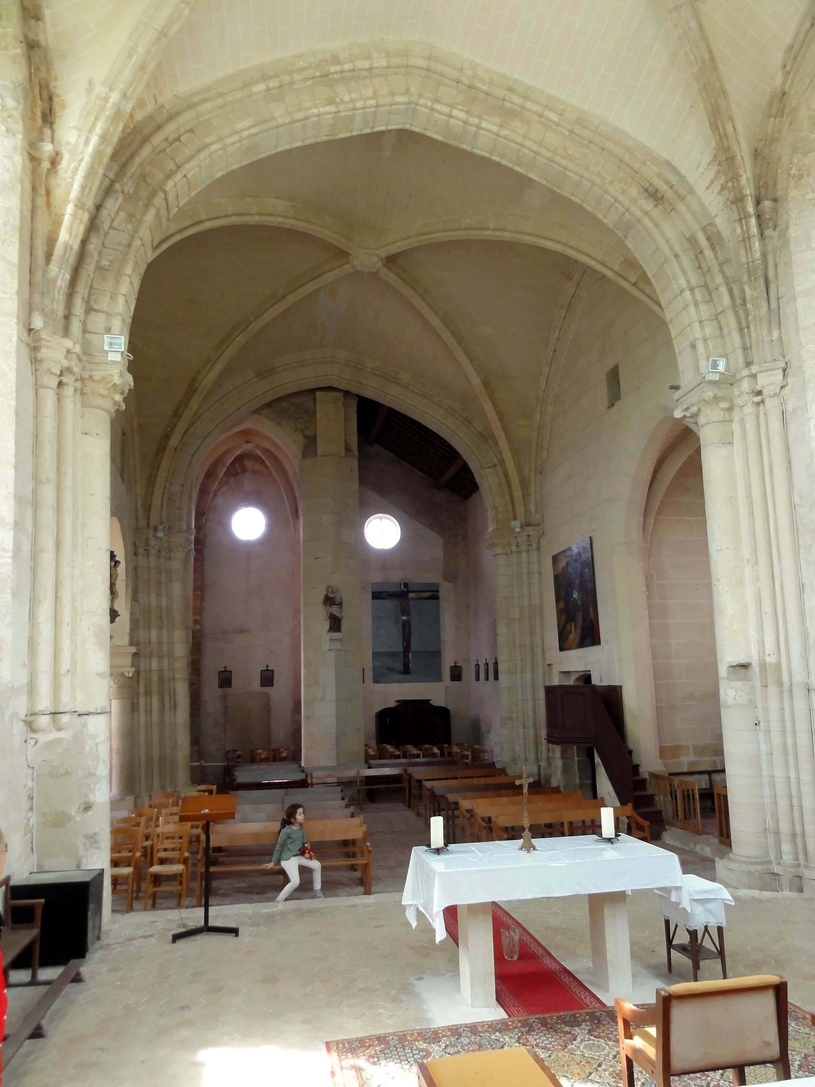 Intérieur de l'église (voir titre).